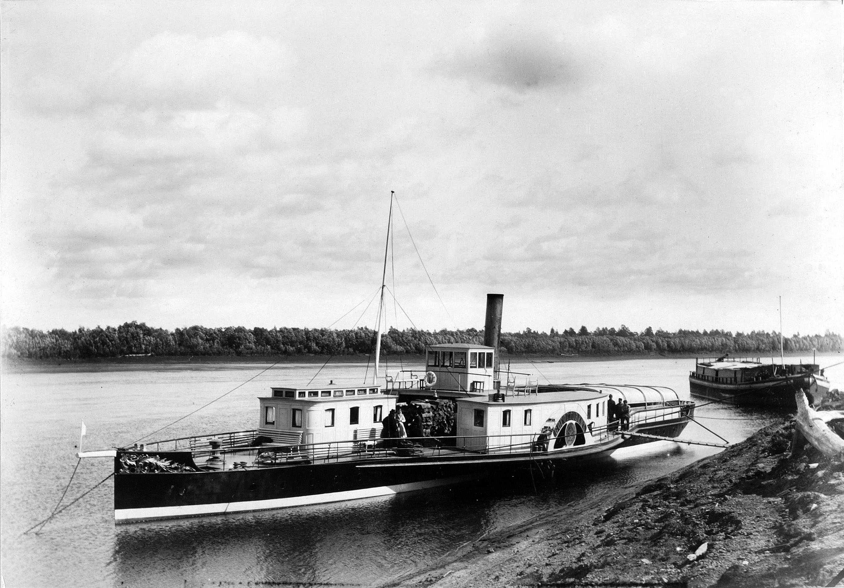 Колёсный пароход "Богословец". Река Тавда (приток Тобола). Тобольская губерния. 1890.